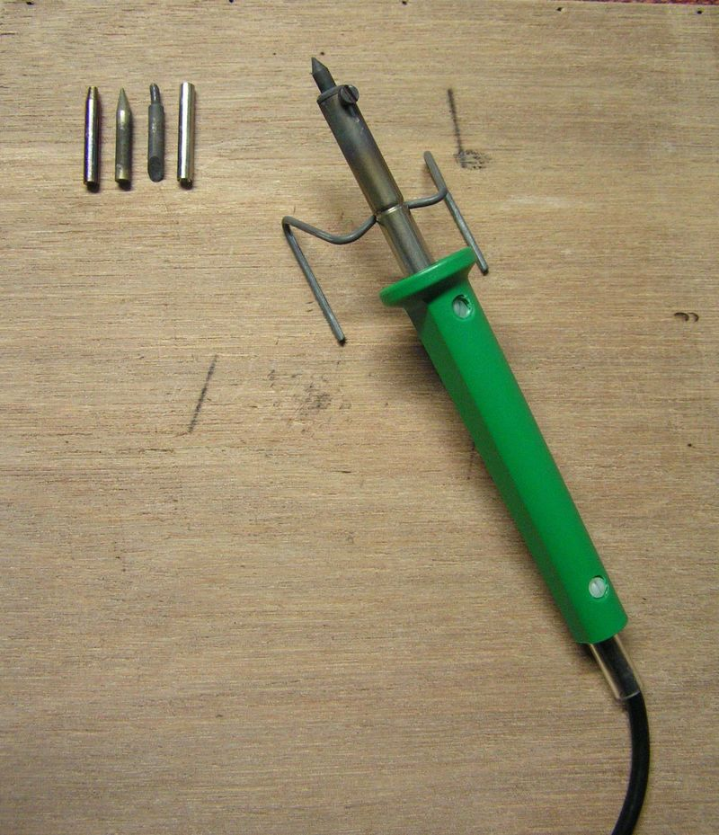 Pyrograveur simple et ses embouts